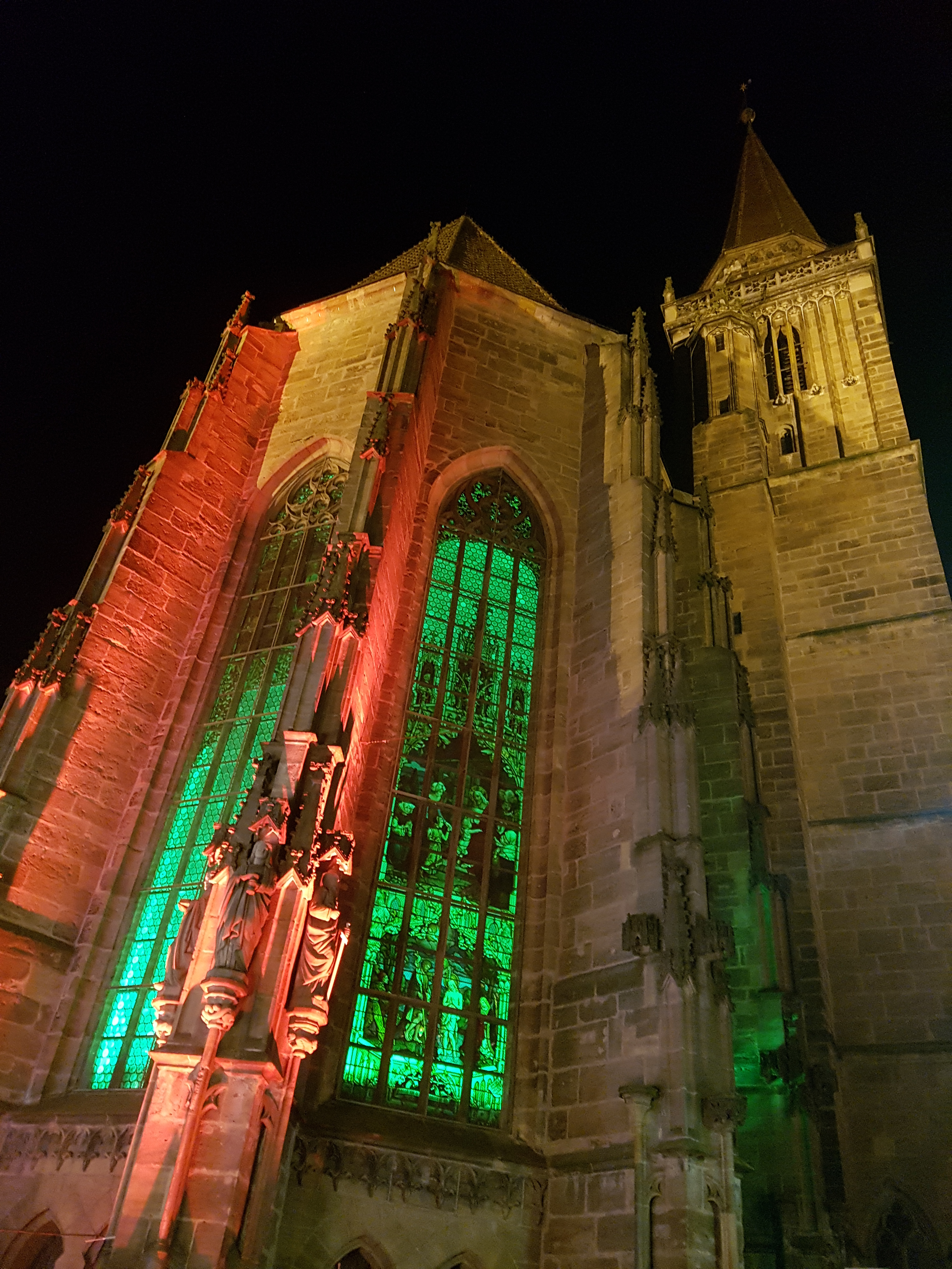 St. Johannis - Lichtinstallation an der langen Einkaufsnacht 2016